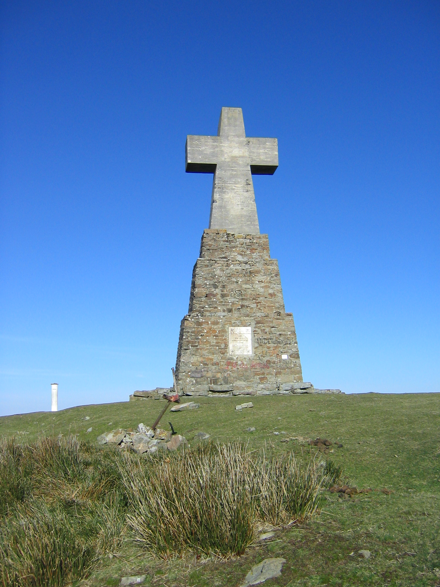 Montaña Saibigain Abadiano, Vizcaya, País Vasco, España.